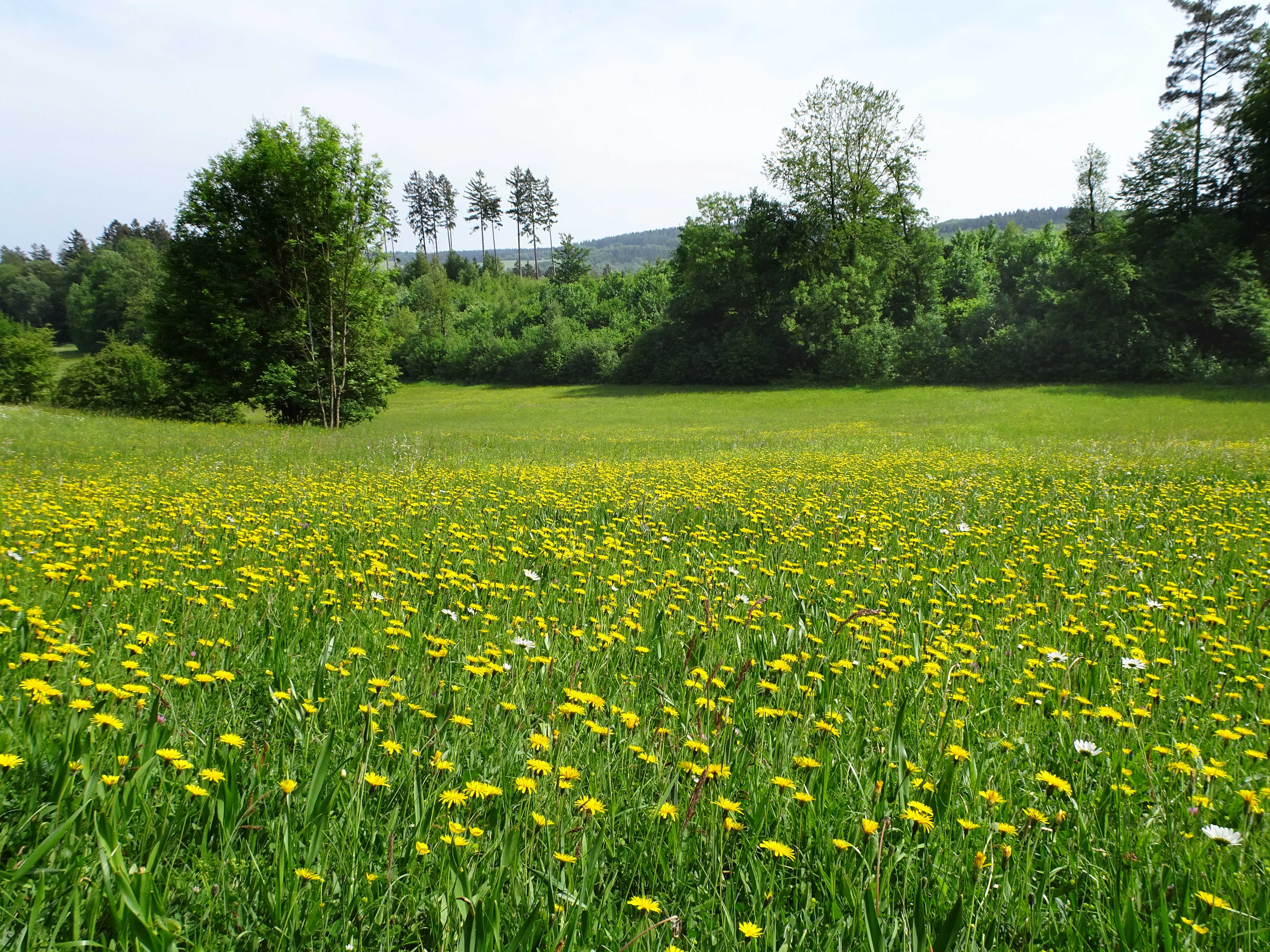 Die Reichenbacher Kalkberge sind ein strukturreiches Gebiet mit schützenswerten Biotopen im nordhessischen Werra-Meißner-Kreis. Wegen ihrer Artenvielfalt wurden die Reichenbacher Kalkberge zum Naturschutzgebiet erklärt und als gleichnamiges Fauna-Flora-Habitat-Gebiet mit der Nr. 4824-301 Teil des europäischen Schutzgebietsnetzes Natura 2000. Innerhalb des Schutzgebiets wurde ein Naturwaldreservat im Bereich der Ruine Reichenbach ausgewiesen.